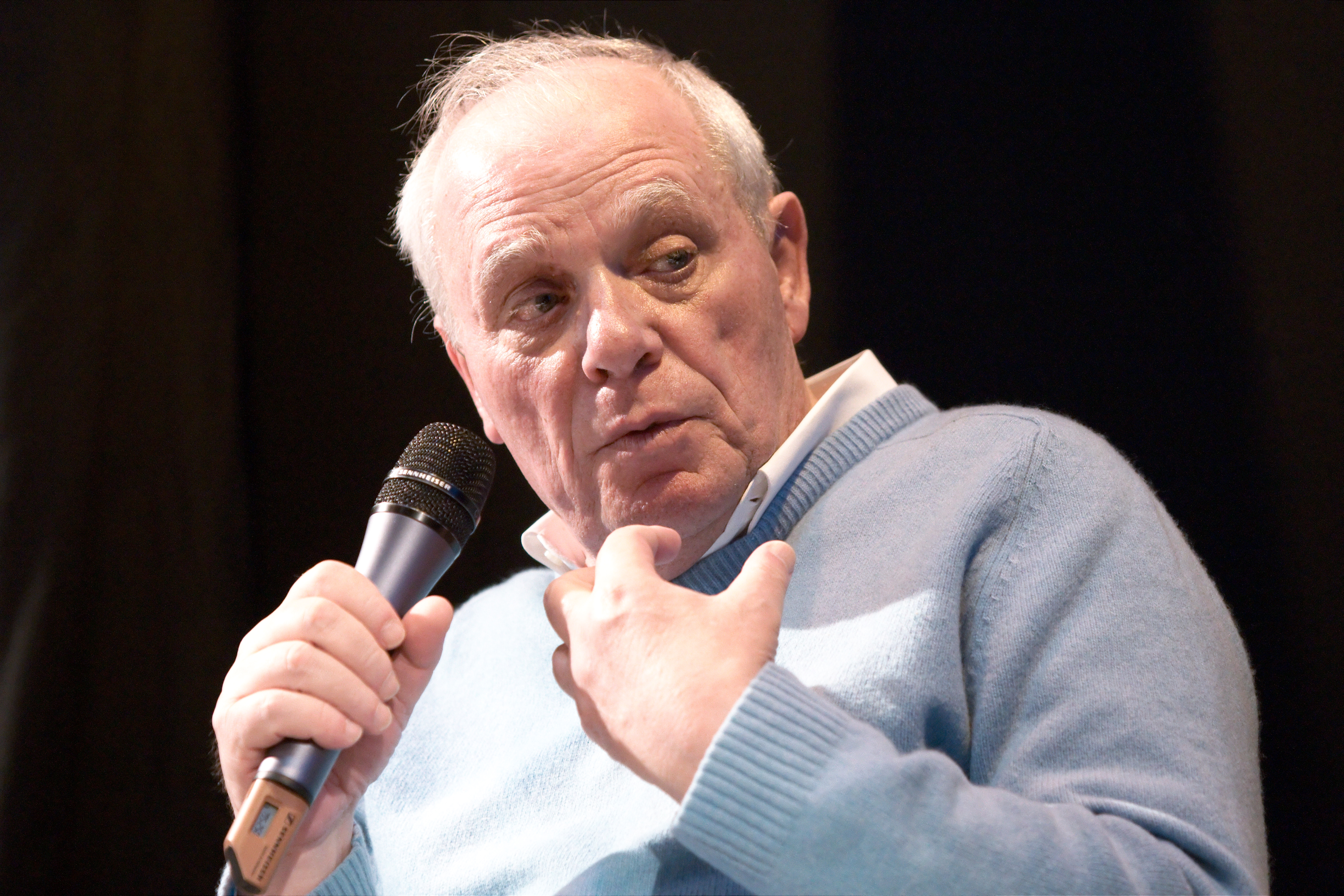 António Lobo Antunes au Salon du livre de Paris lors d'un tête-à-tête avec Jean d'Ormesson.